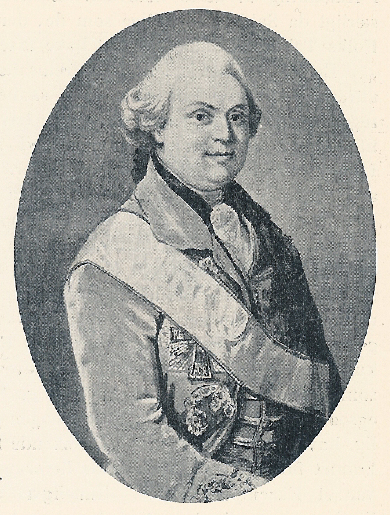 Grev Frederik Vilhelm Conrad Holck. 1742-1800.